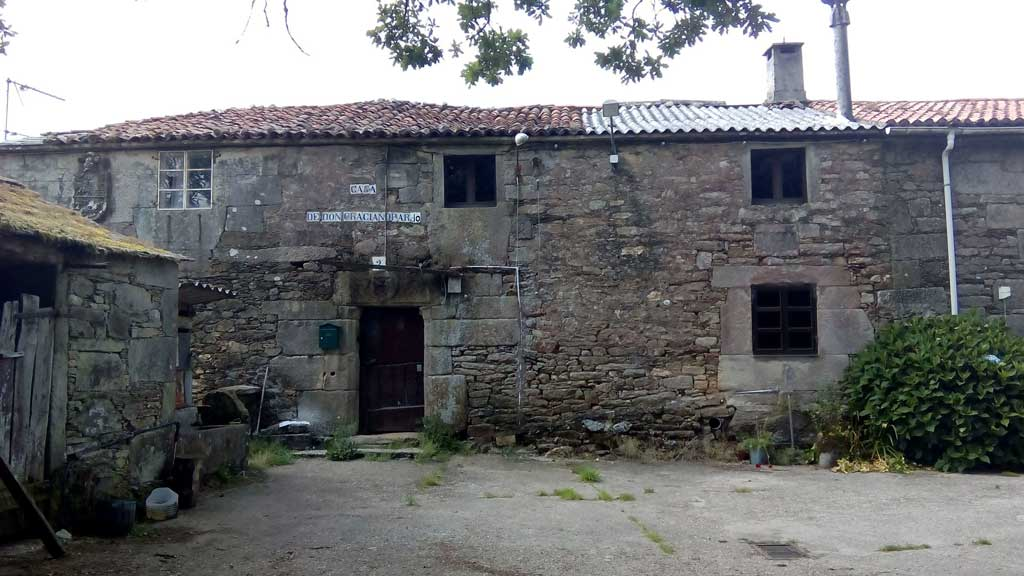 Vista de San Cibrá, Curtis.